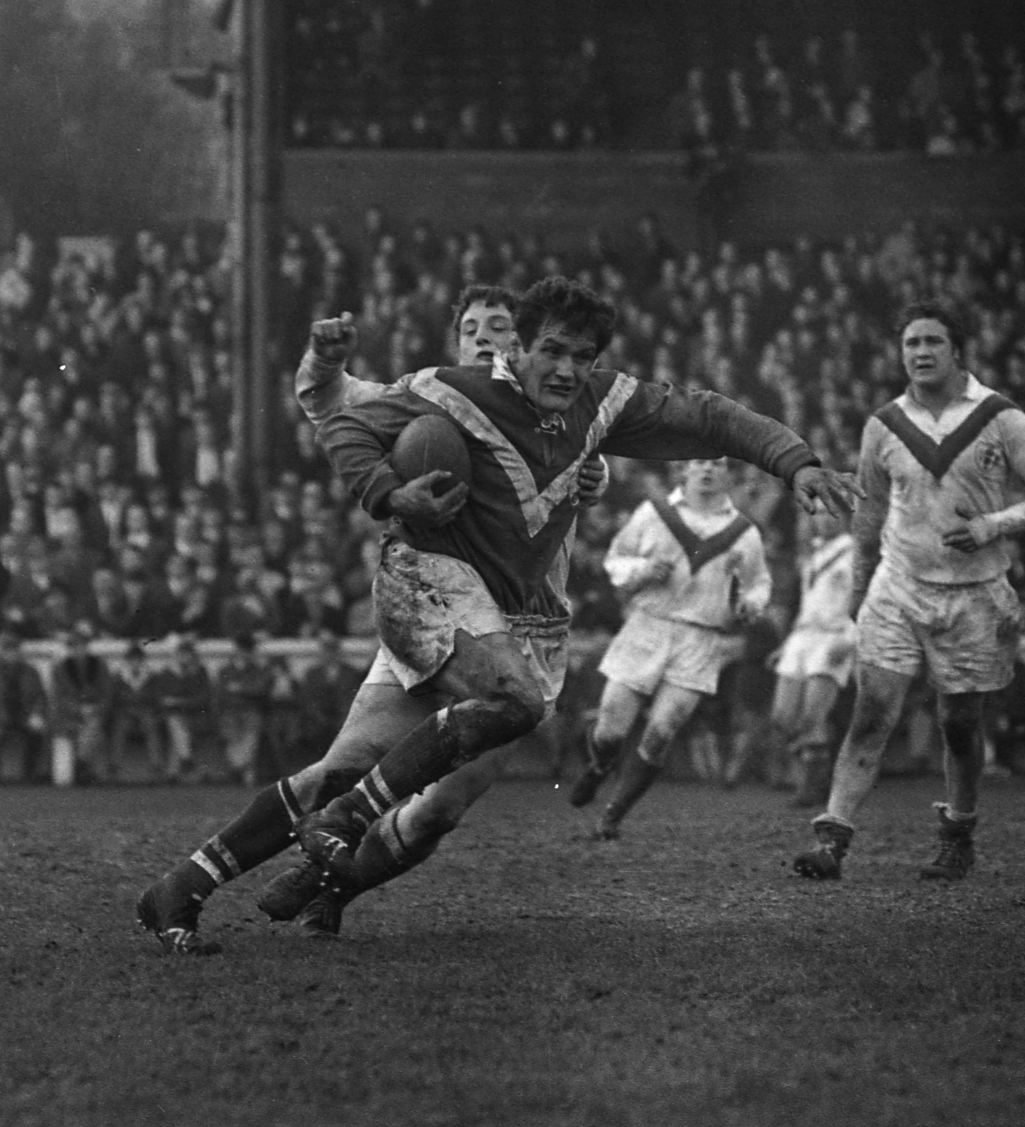 4 Mars 1967. L'équipe de France de rugby à XIII rencontre l'équipe d'Angleterre à Wigan. Cliché pris durant le match ; au 1er plan action de jeu, le joueur toulousain Georges Aillières a le ballon ; en arrière plan tribune du stade Central Park.